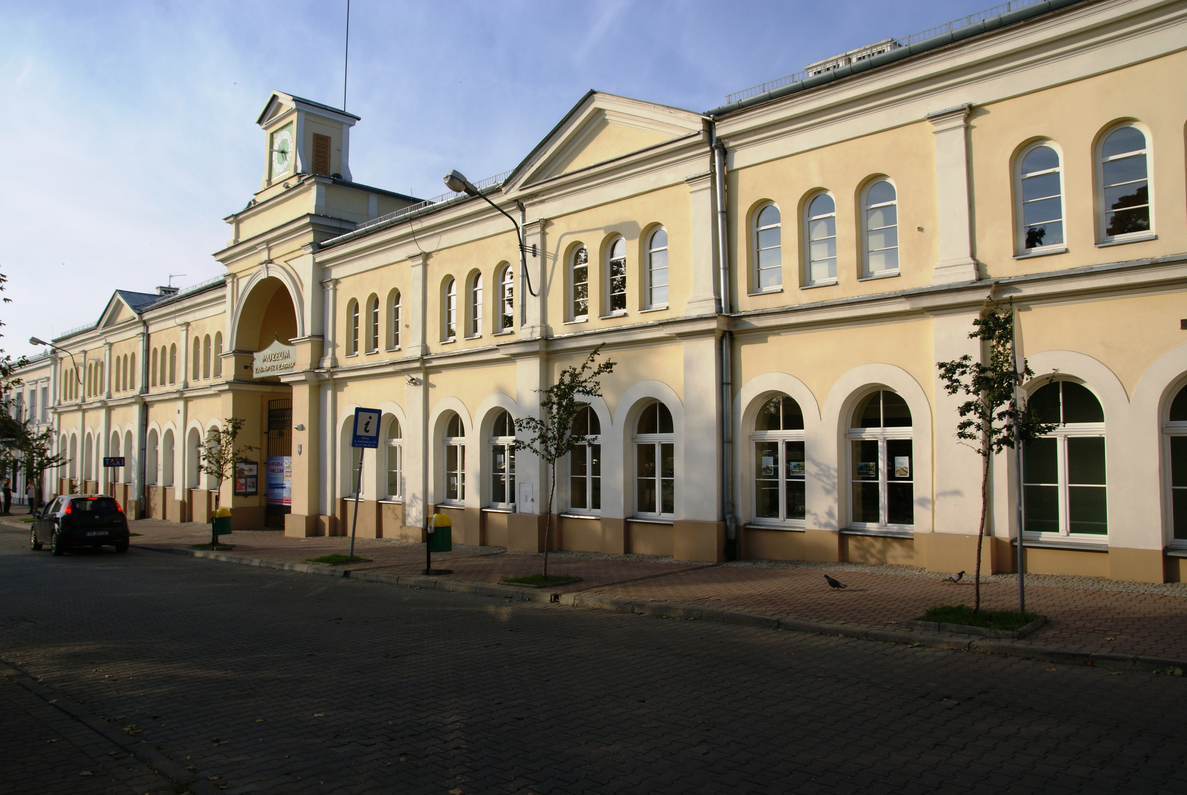 Dom (Bazar) Kielce pl. Wolności 2 / Ewangelicka 2, Kielce 396 z 24.07.1976.